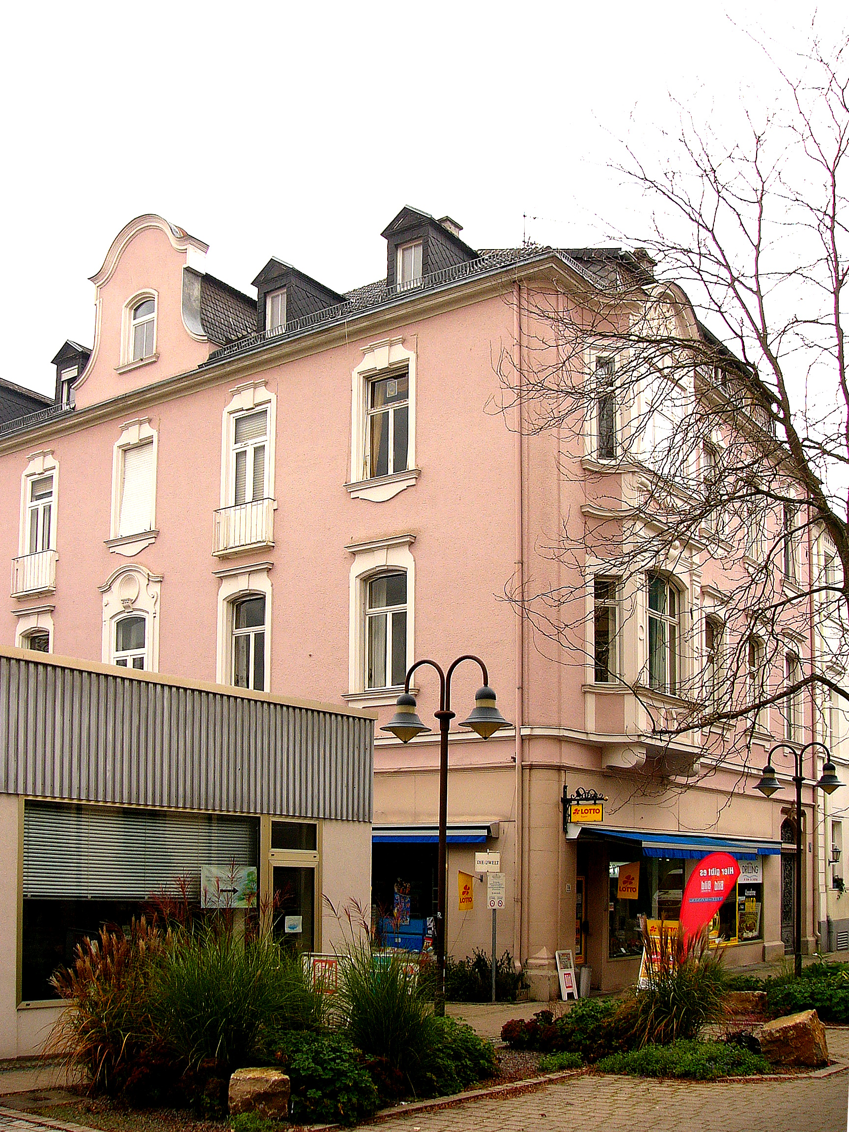 Wohn- und Geschäftshaus; dreigeschossiger Massivbau mit Walmdach, Erker mit Putzdekor und Zwerchhaus mit geschwungenem Giebel, barockisierender Späthistorismus, um 1905. This is a photograph of an architectural monument.